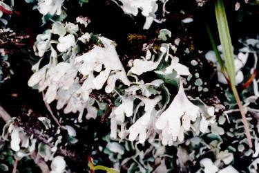 Cladonia apodocarpa